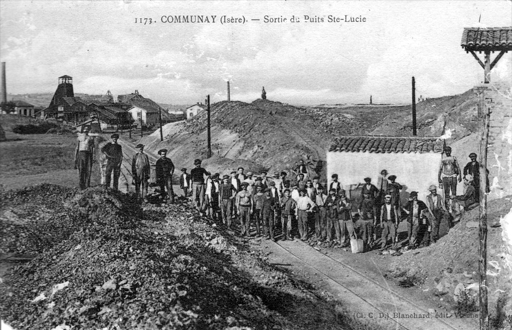 Sortie du puits S.te Lucie. Mines d'anthracite de Communay, Rhone, France. Carte postale ancienne.